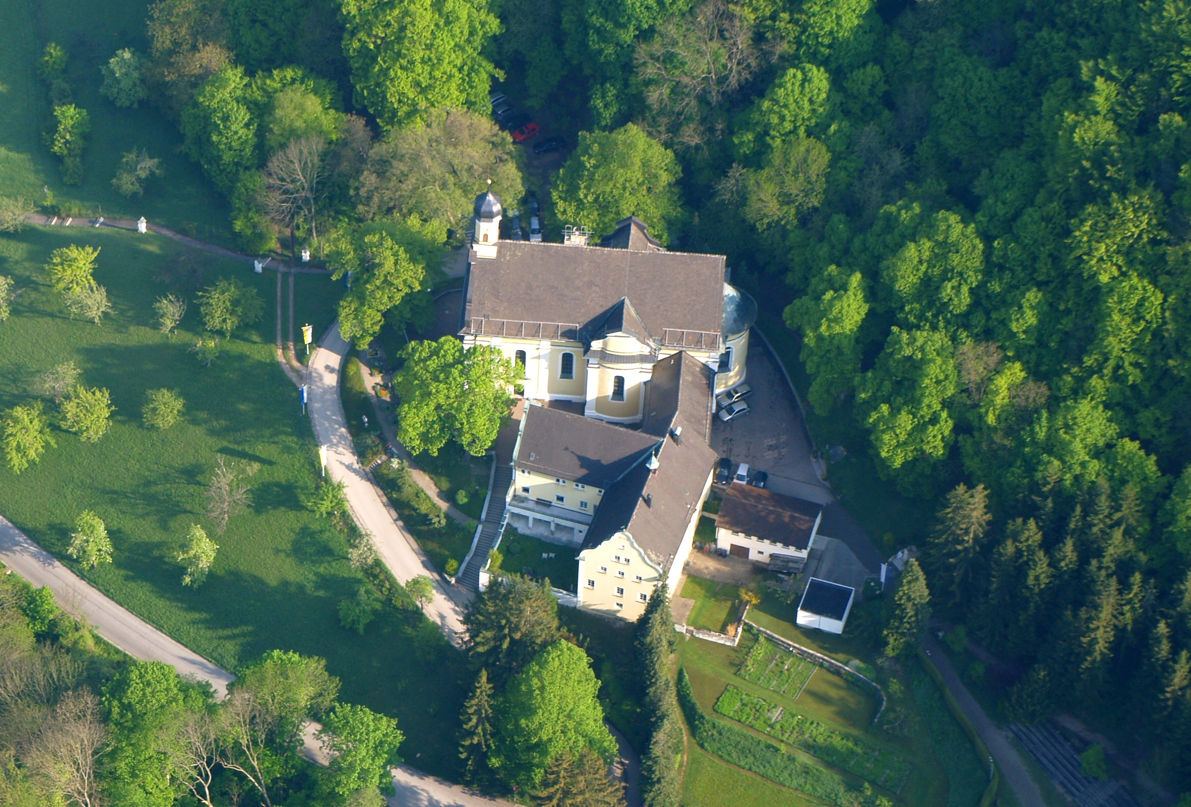 Luftaufnahme Ave Maria Deggingen